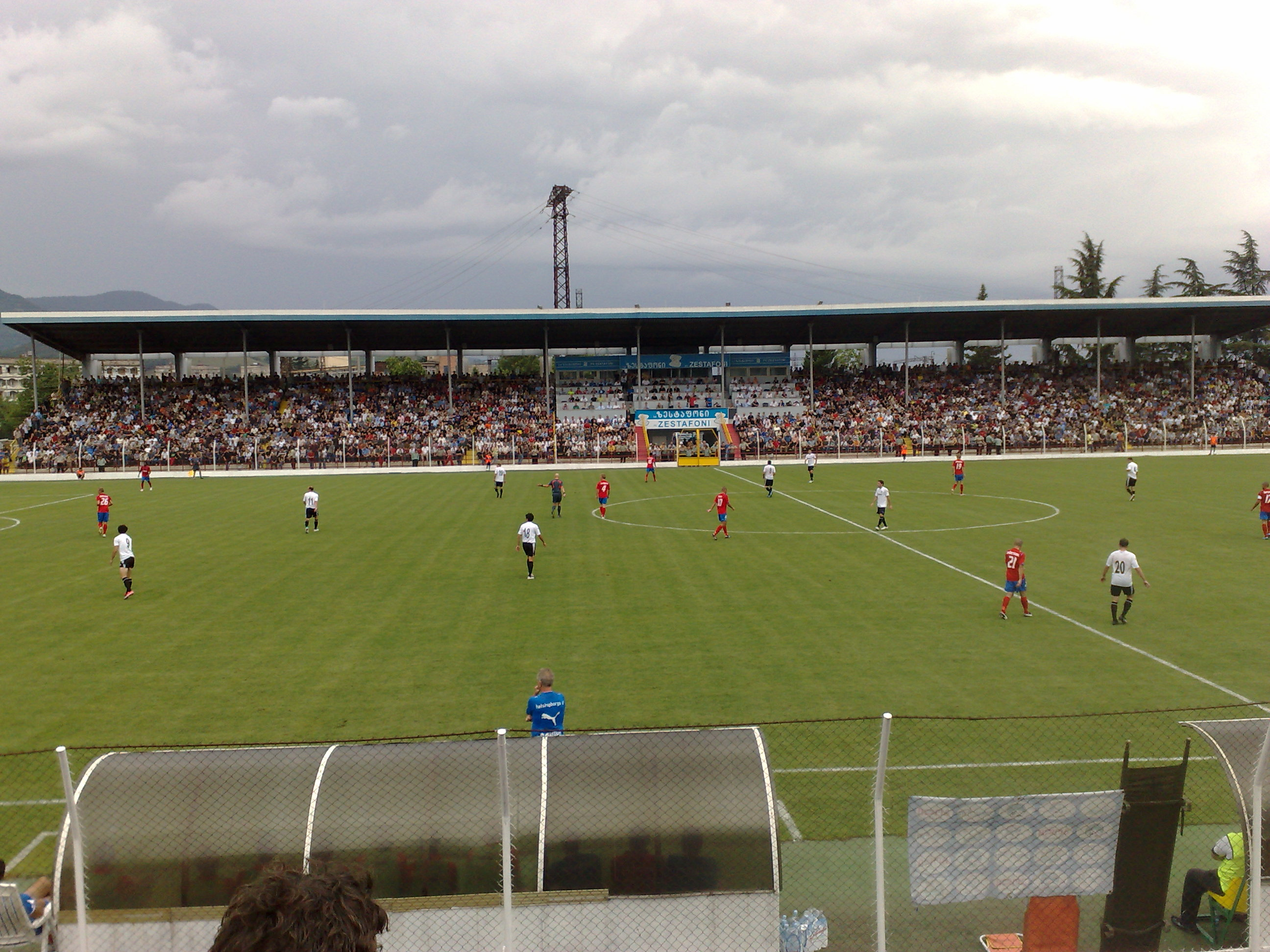 Kotola001